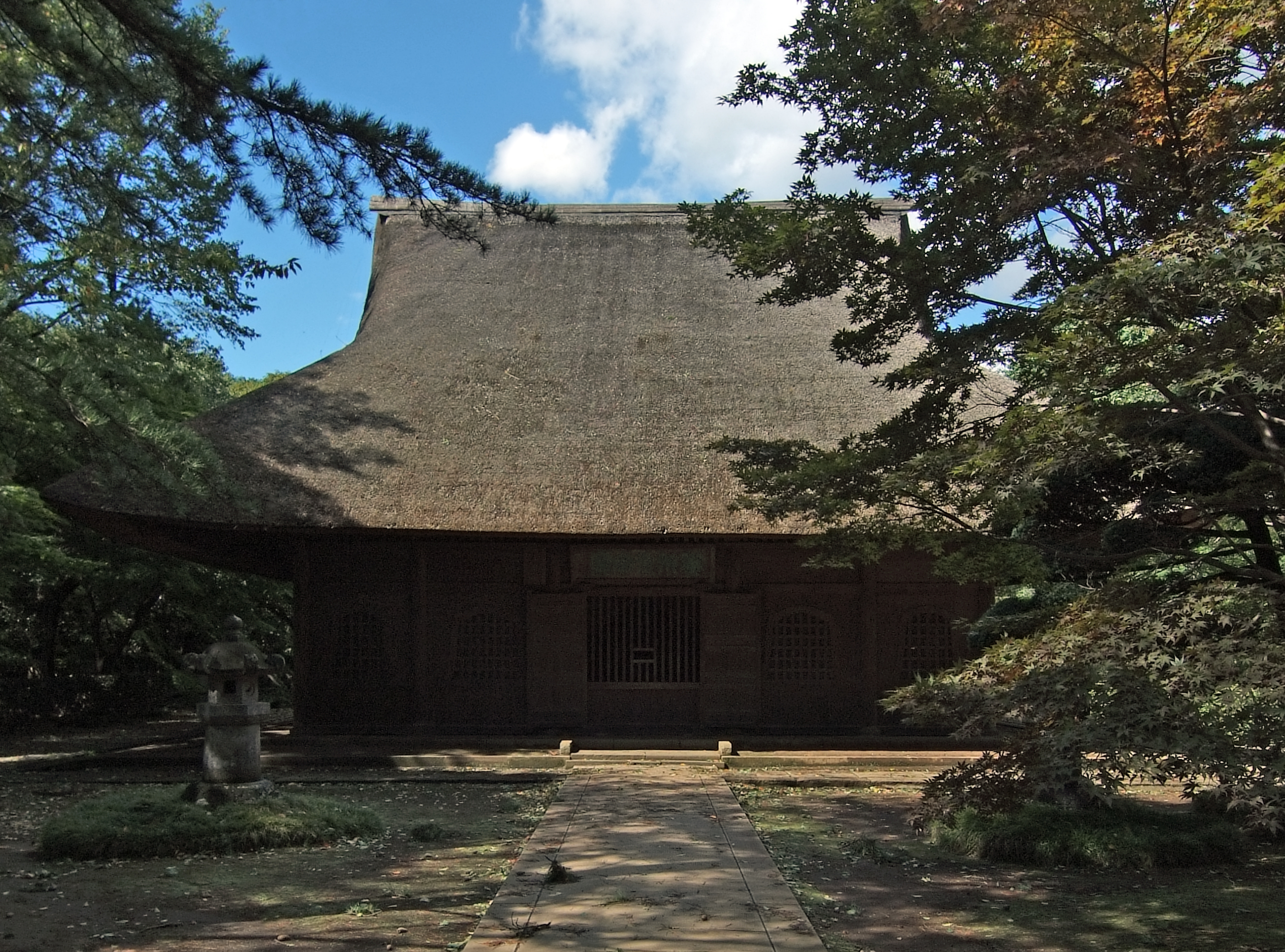 Heirin-ji Butsuden, at Niiza Saitama Japan, built in 1664.